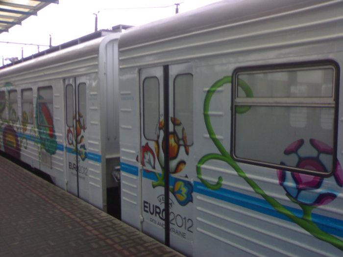 Залізнична платформа Лівий берег